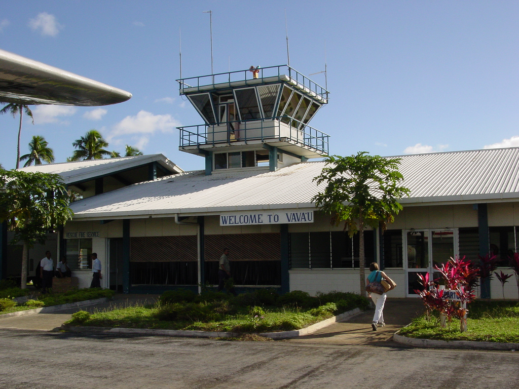 Arrival at airport, Vava'u, Tonga.